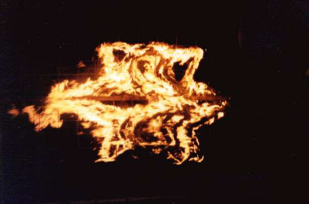 כתובת אש עם סמל הצופים. צילם י.ש. 22:31, 27 בספטמבר 2006 (IDT)